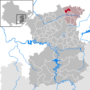 Rosendorf in Thuringia - Saale-Orla-Kreis